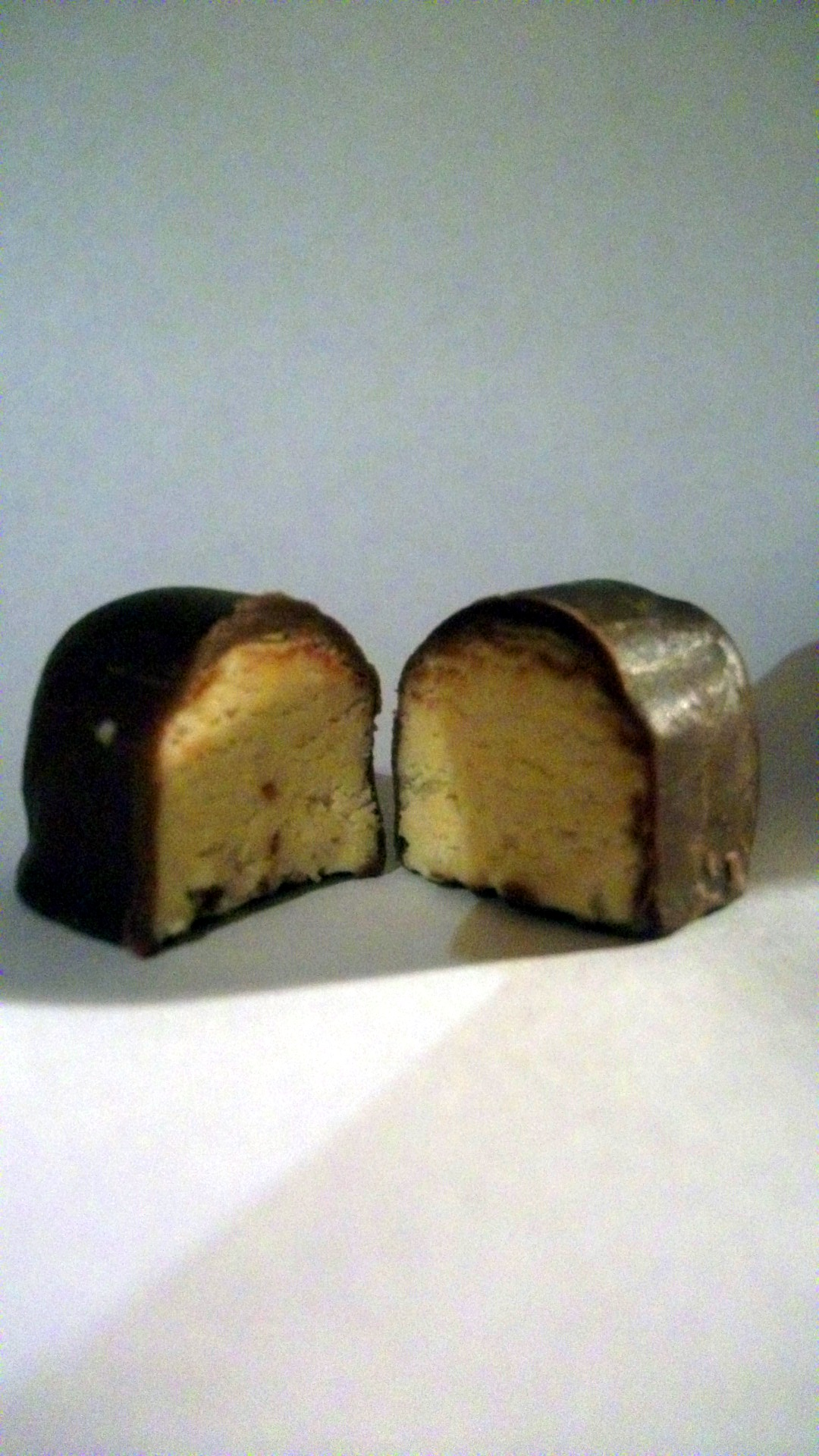 Szaloncukor félbevágva.